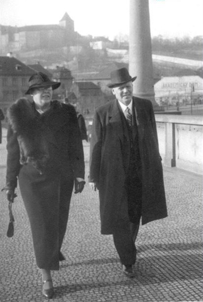 Richard rytíř Klenka z Vlastimilu (1873-1954), český architekt, designér, pedagog a průkopník cykloturistiky